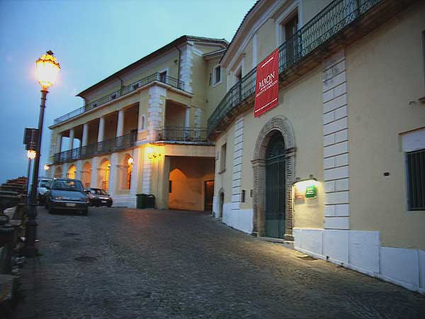 Sede del MAON. Museo d'Arte dell'Otto e Novecento di Rende